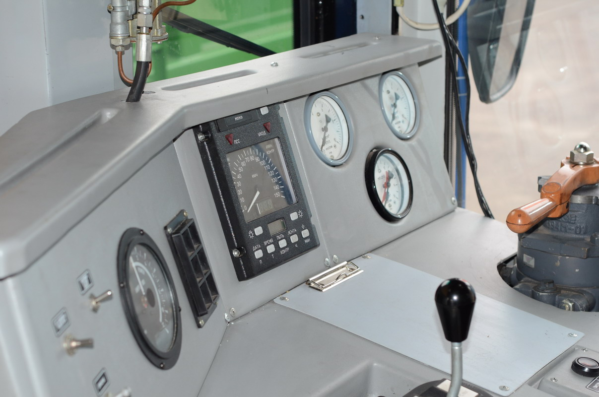 Блок управления электронного скоростемера КПД-3ПВ на борту тепловоза